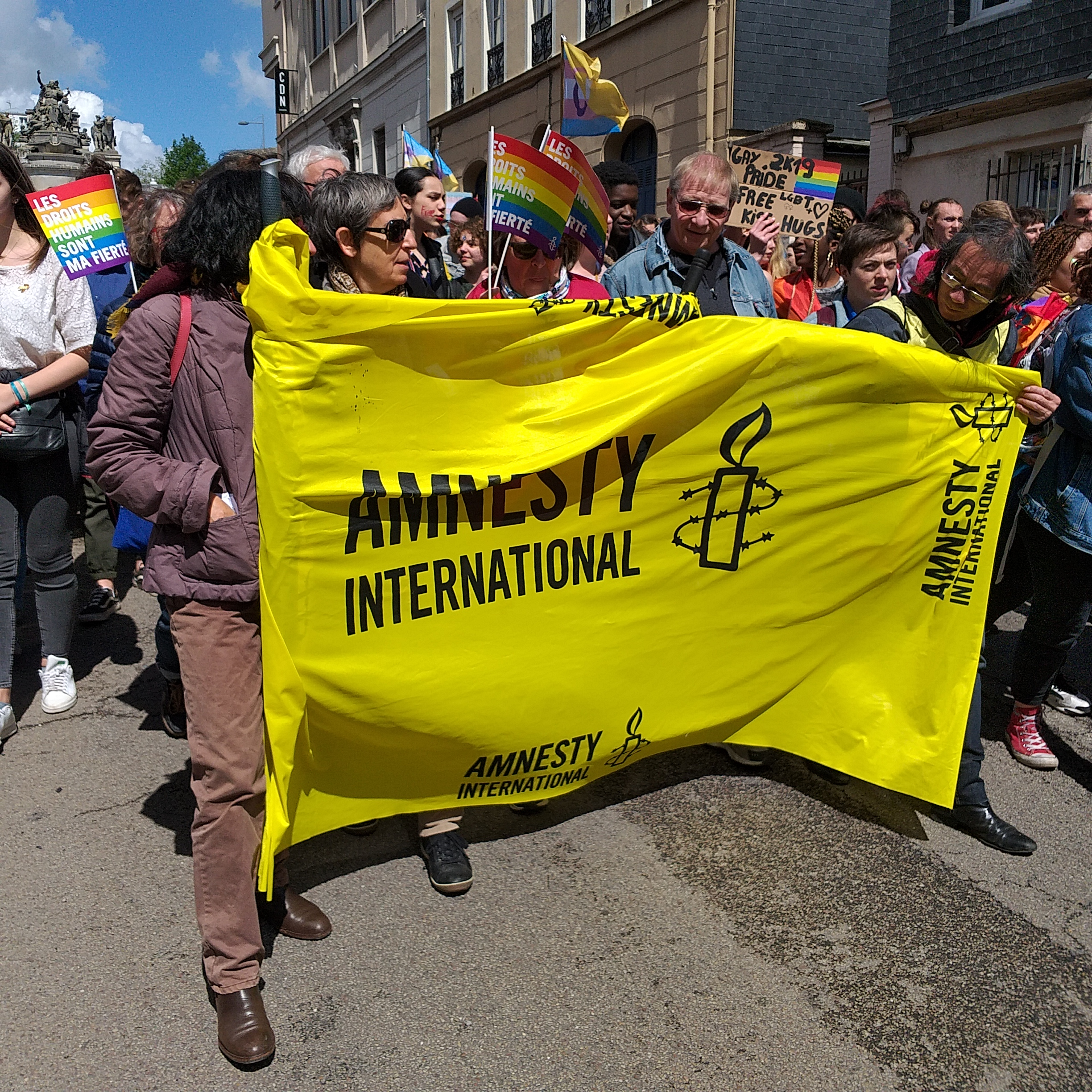 Marche des fiertés rouen 20190504 - amnesty international